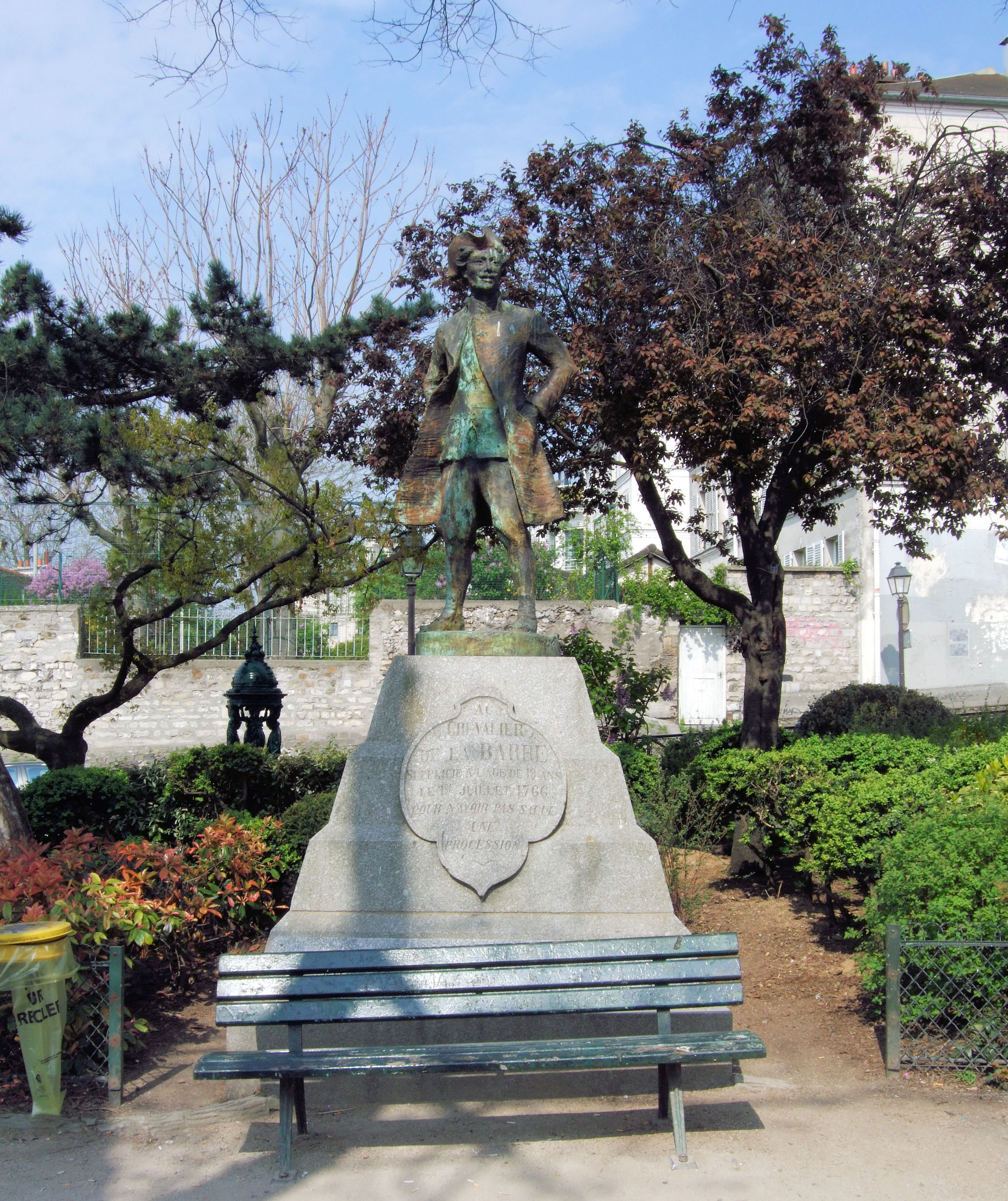 Chevalier de la Barre Statue In Montmartre, Paris.